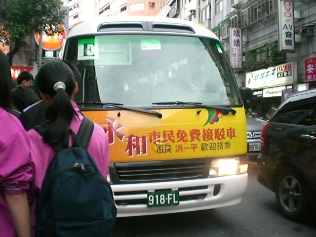 臺北縣永和市市民免費接駁車E線豐田Coaster中型巴士918-FL車頭。